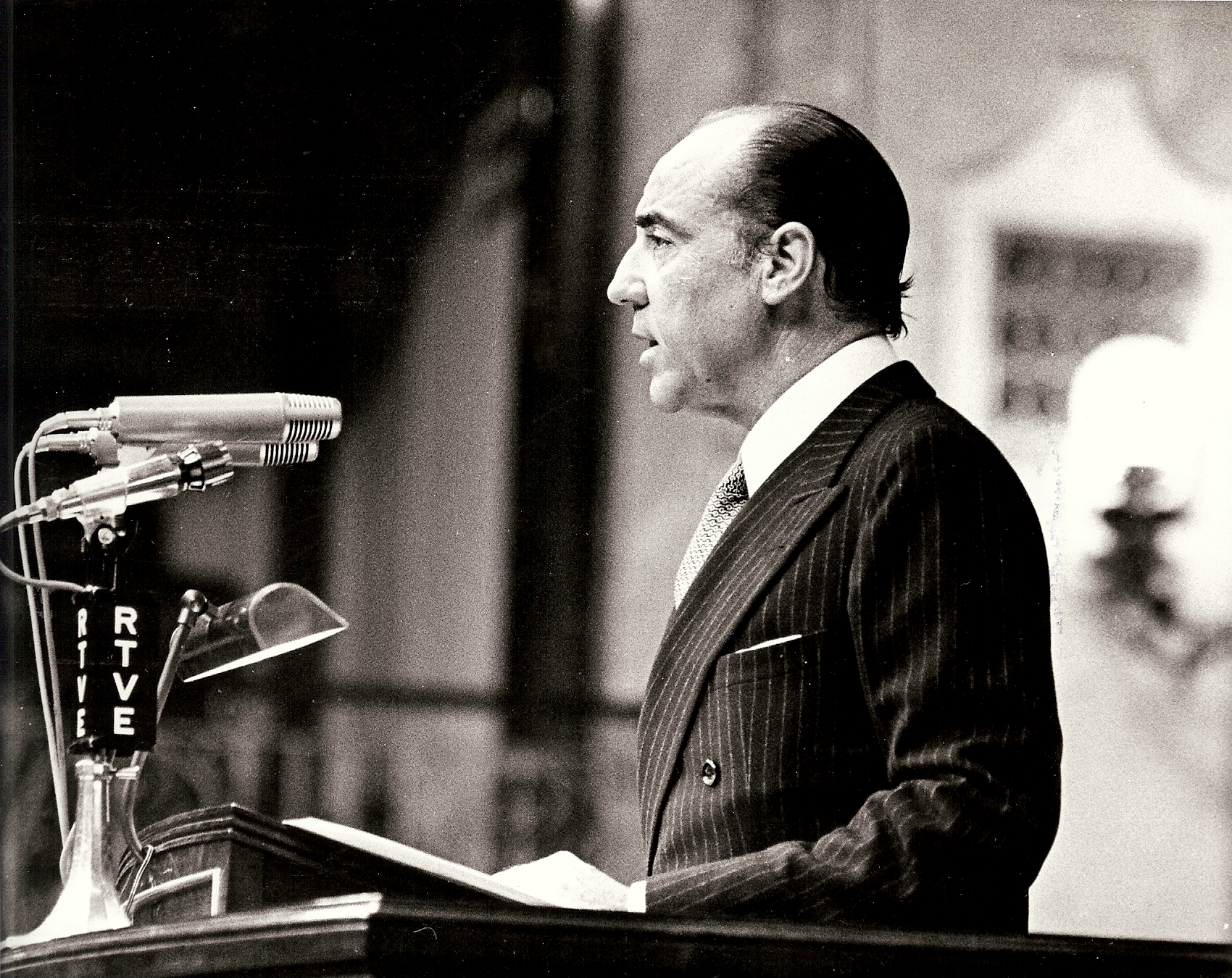 Don José María Sánchez-Ventura, ministro de Justicia, durante su intervención en el Pleno de las Cortes, donde se presentó para su aprobación el proyecto de Ley 14/1975 , de 2 de mayo.